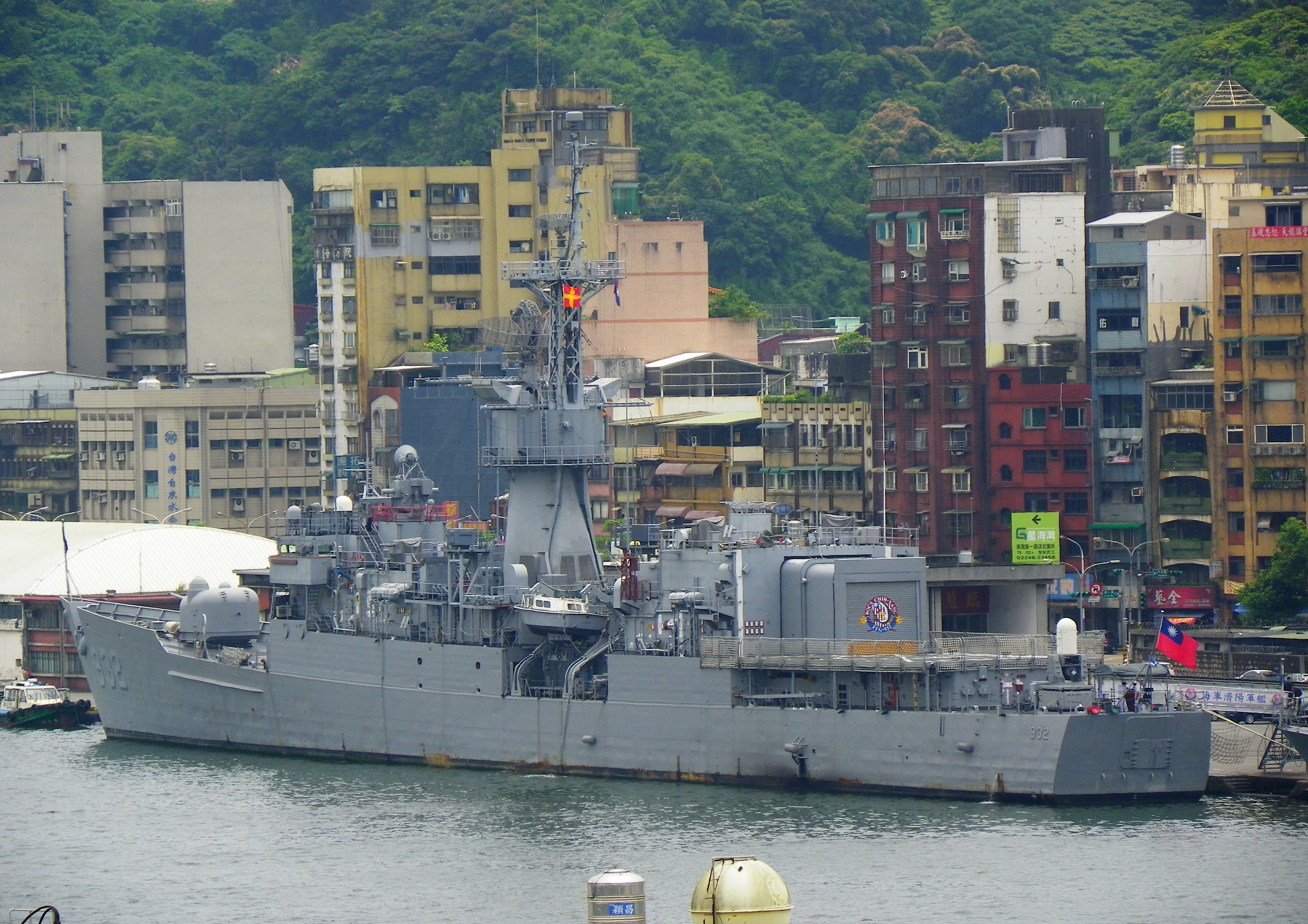 停泊於基隆港東五號碼頭的中華民國海軍巡防艦濟陽號（FFG-932）左舷。